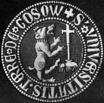 Siegel des Volksbundes im 15. Jahrhundert